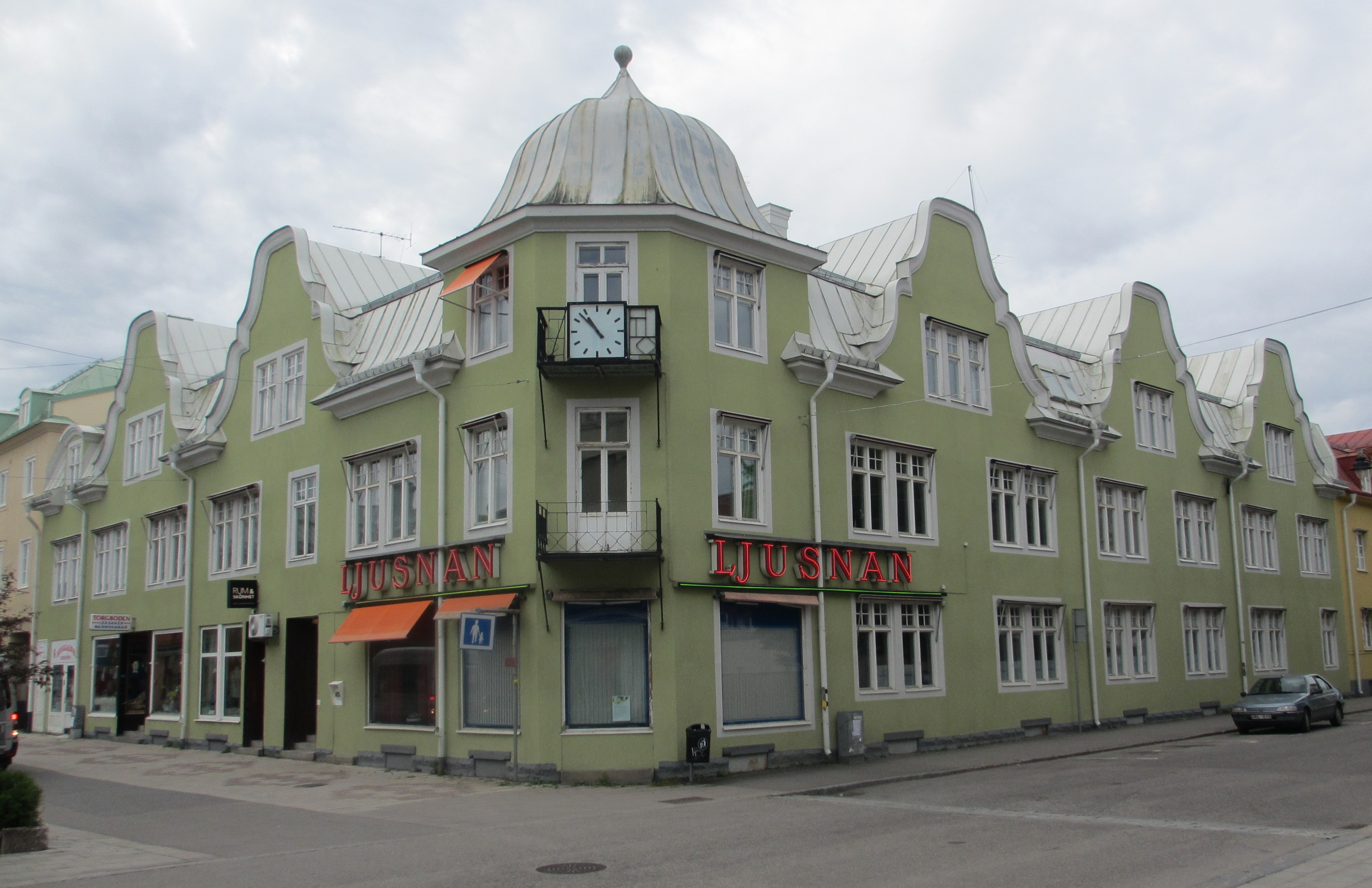 Ljusnans tidningshus i Bollnäs.